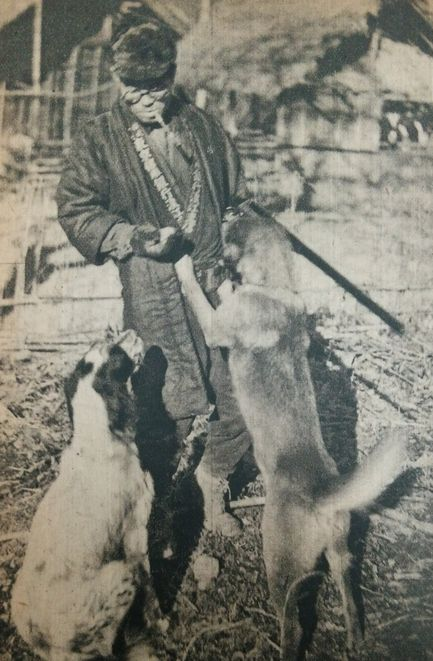 佐々木俊一